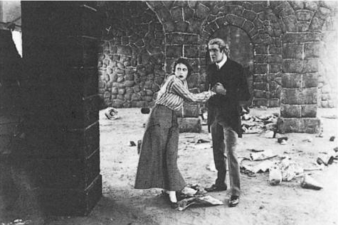 Escena de la película dirigida por Francis Ford La moneda rota (The Broken Coin, 1915) en la que aparecen Grace Cunard y el propio Ford